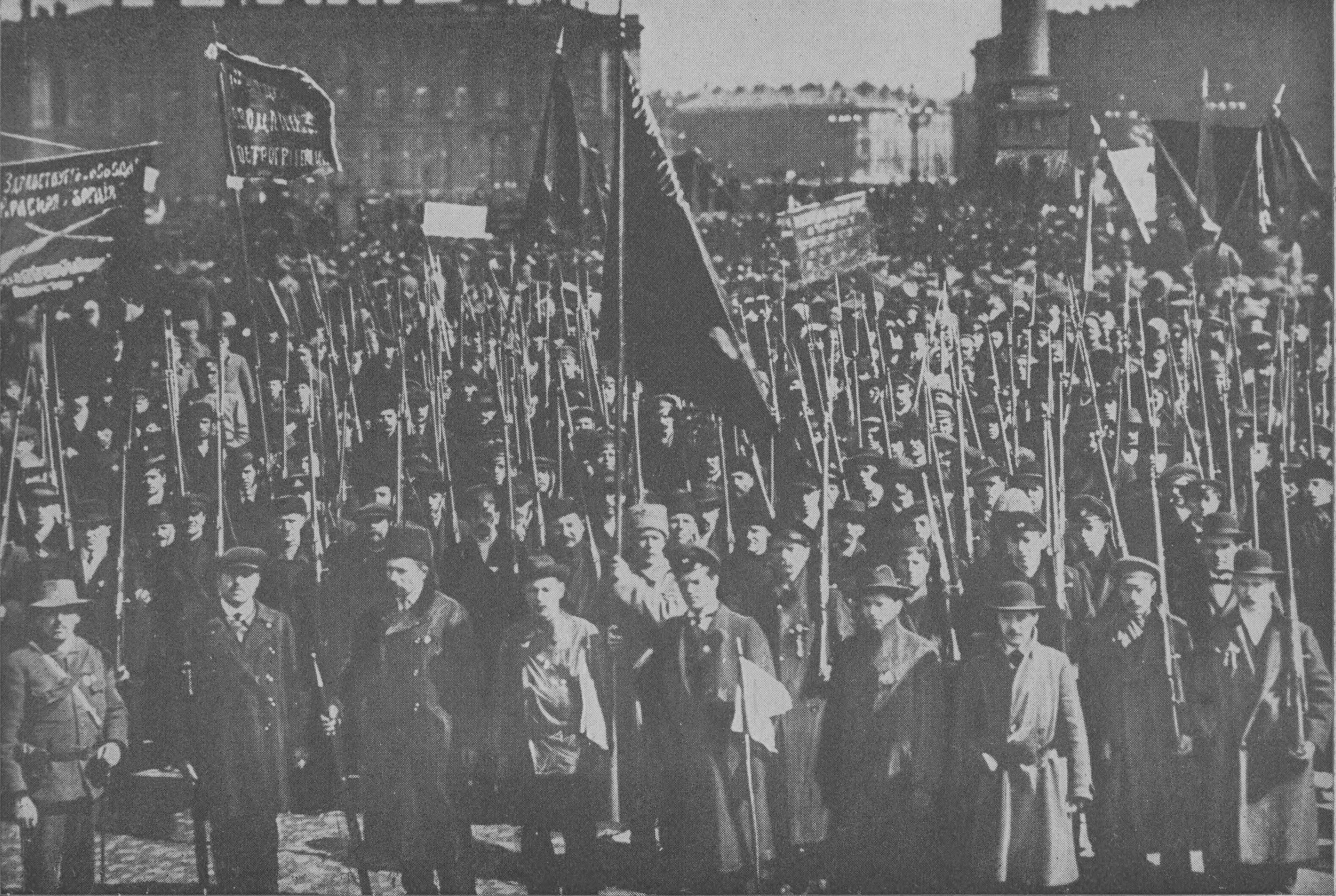 Manifestación de Guardias Rojos junto al Palacio de Invierno en Petrogrado.